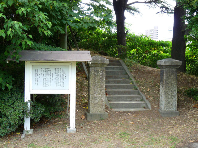 小倉高校 乃木門 付近